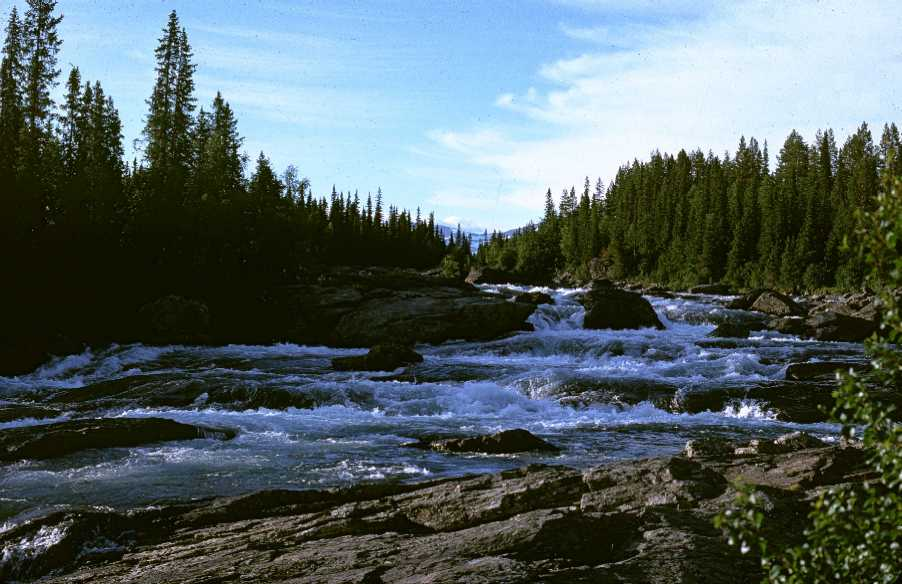 Kamajokk vid kvikkjokk